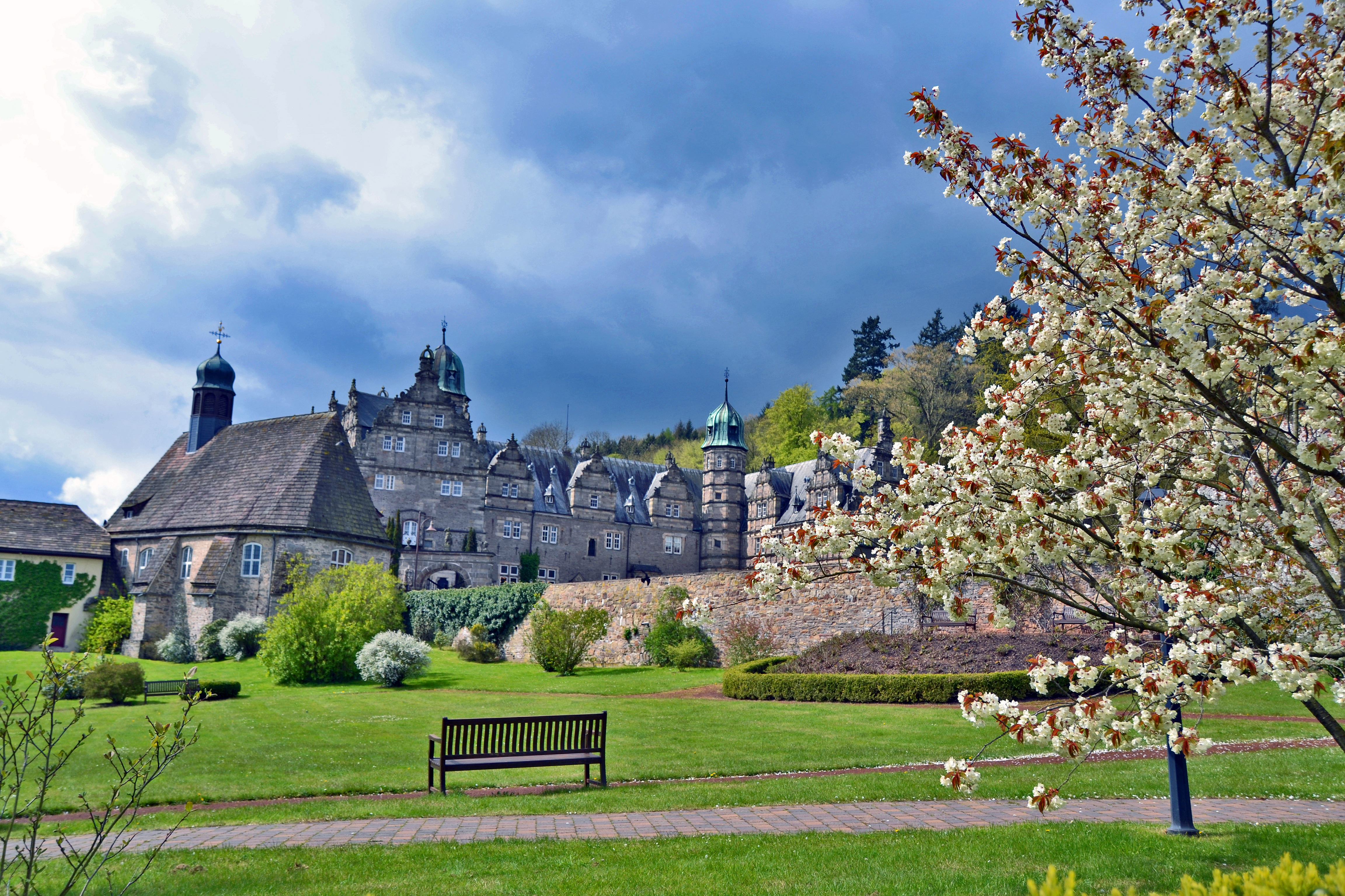 Schloss Hämelschenburg - April 2016